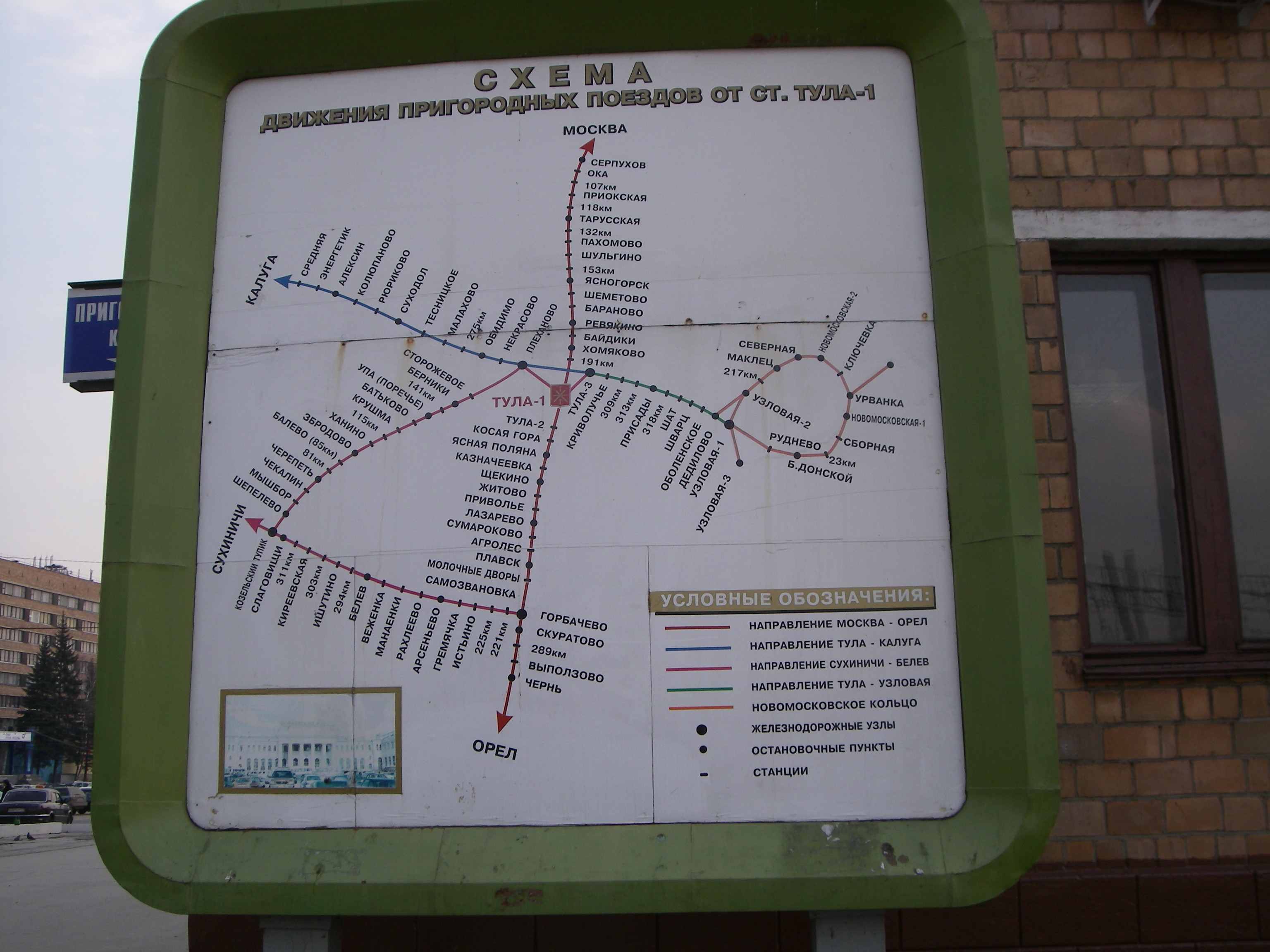 Skemo de vojlinioj de lokaj elektrotrajnoj en Tula